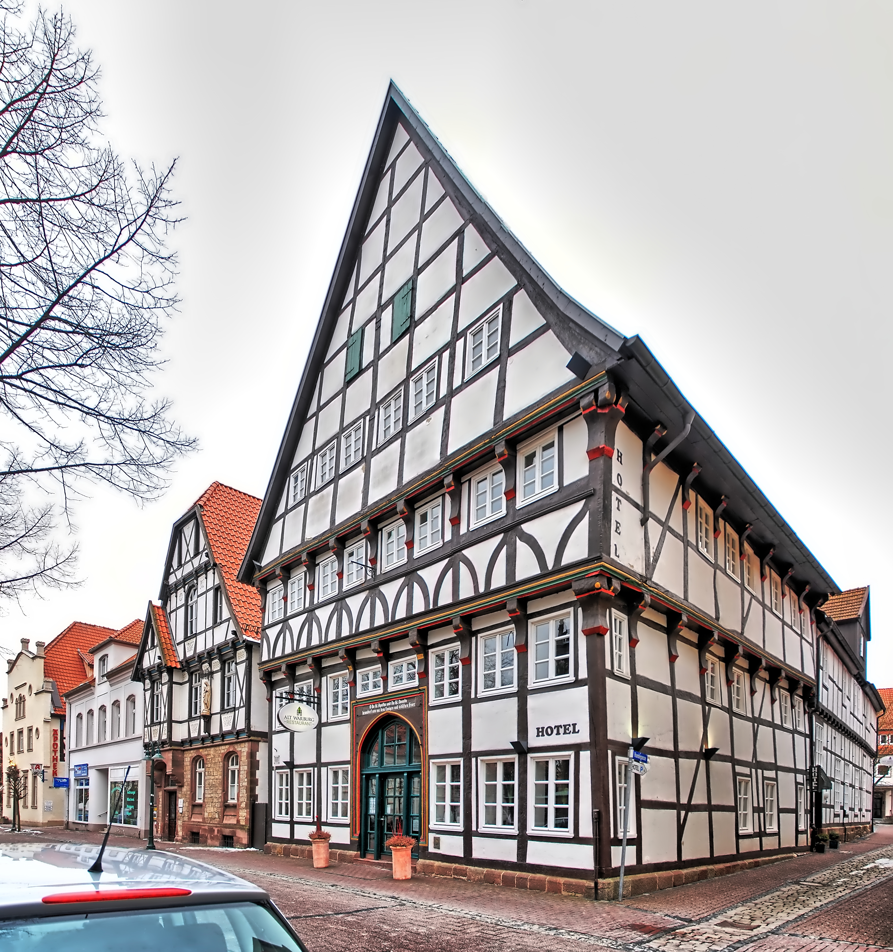 Hotel und Restaurant Alt-Warburg. Spätgotisches Bürgerhaus, Vierständerbau mit 9 Gebinden. 3-geschossig mit Speicherstock, erbaut 1519 / 20. Denkmal-Status. Standort: Kalandstr. Ecke Hundegasse, Warburg